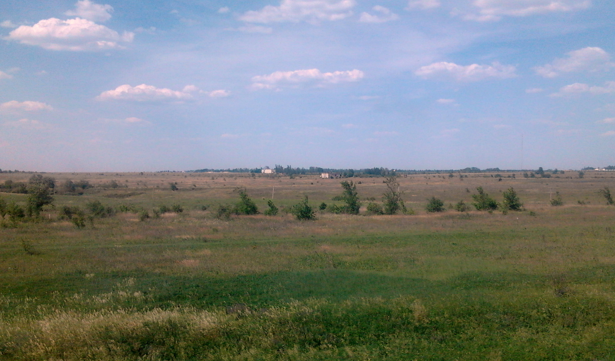 Lipetsky District, Lipetsk Oblast, Russia